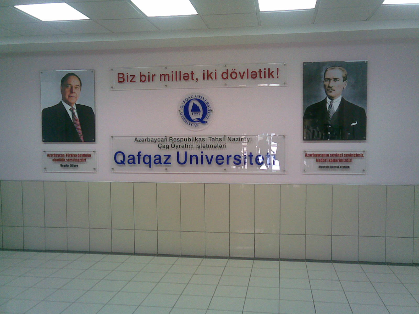 Qafqaz Universitetinin foyesi